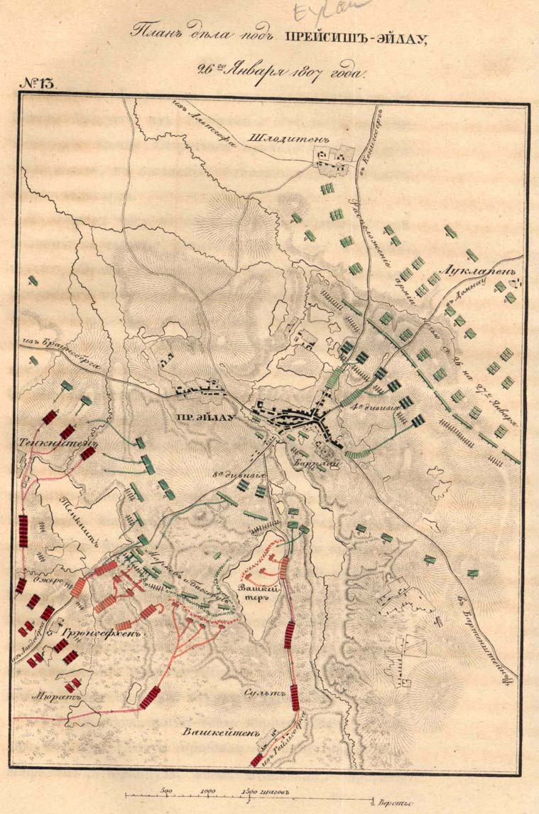 Map Battle of Preussisch Eylau